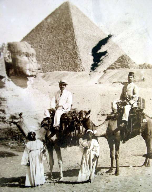 בלום בטיול למצרים, תחילת המאה הקודמת